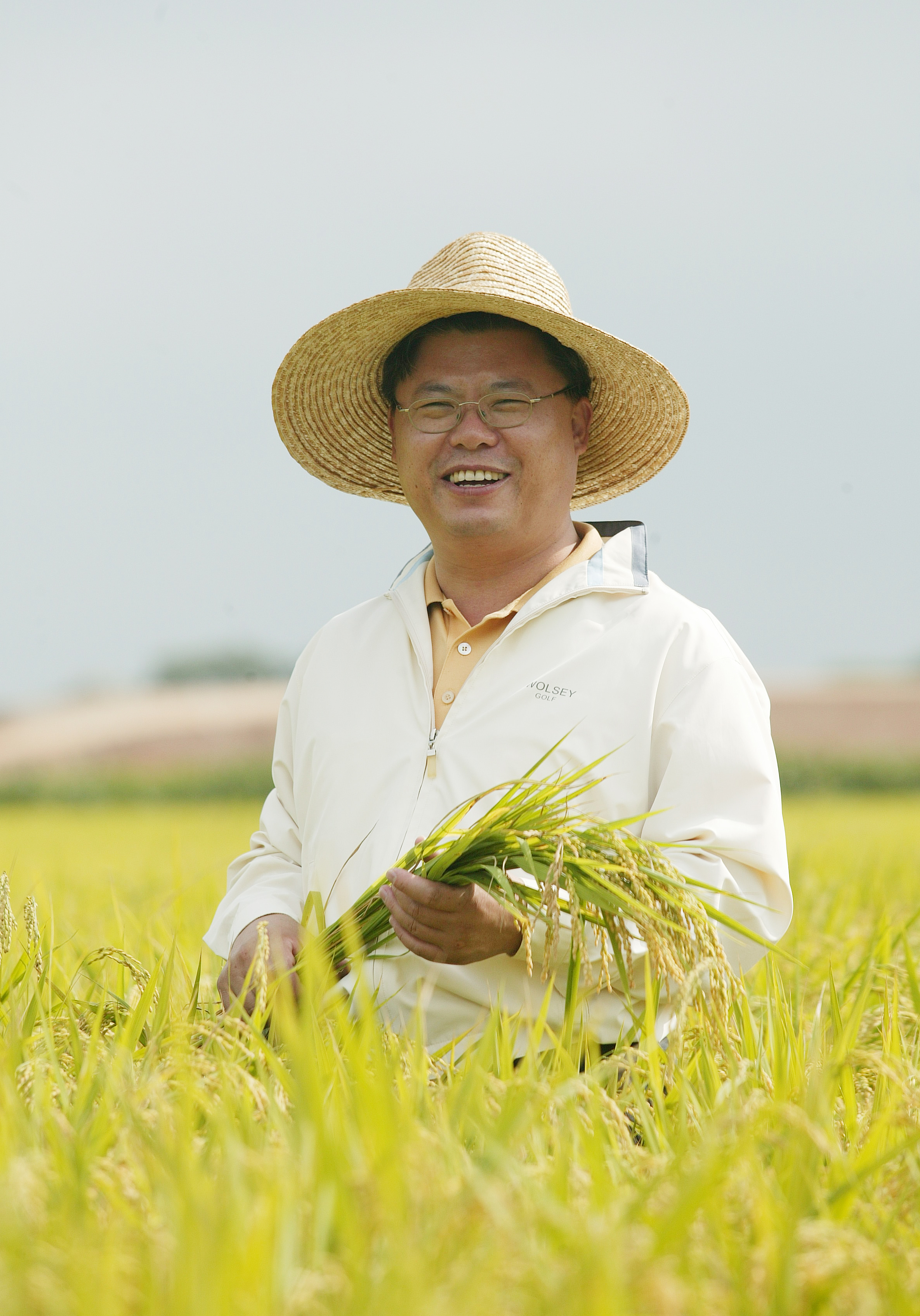 함평군수 재임시절 가을 추수 현장 방문지에서 이석형